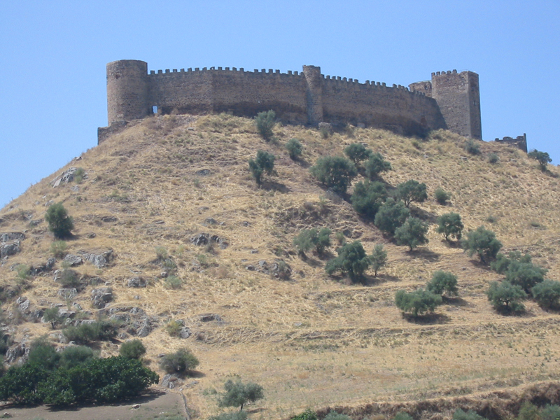 Cette image est la mienne.